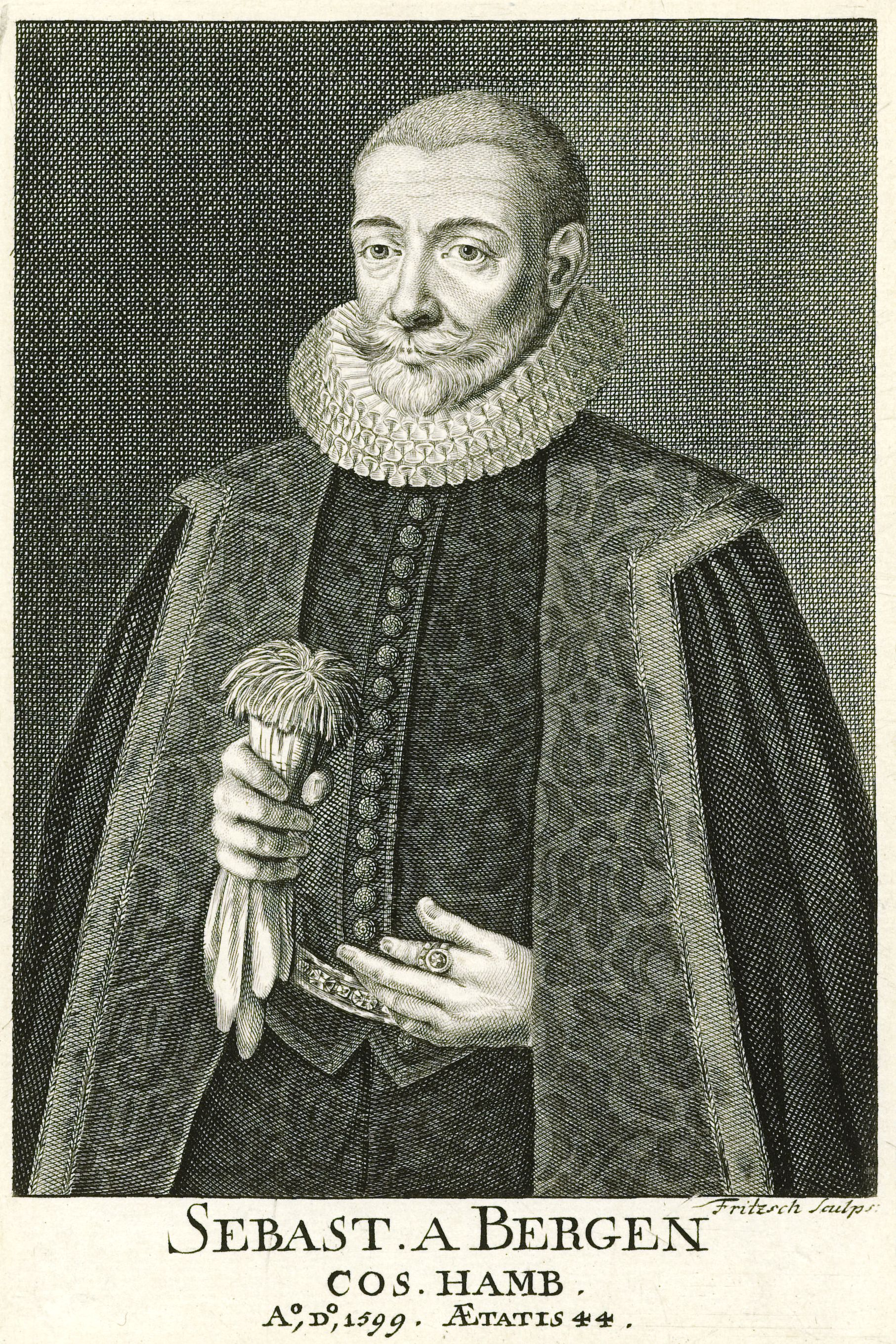 Sebast. A. Bergen